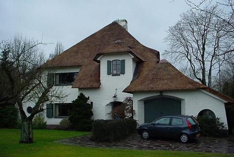 zelf gemaakt